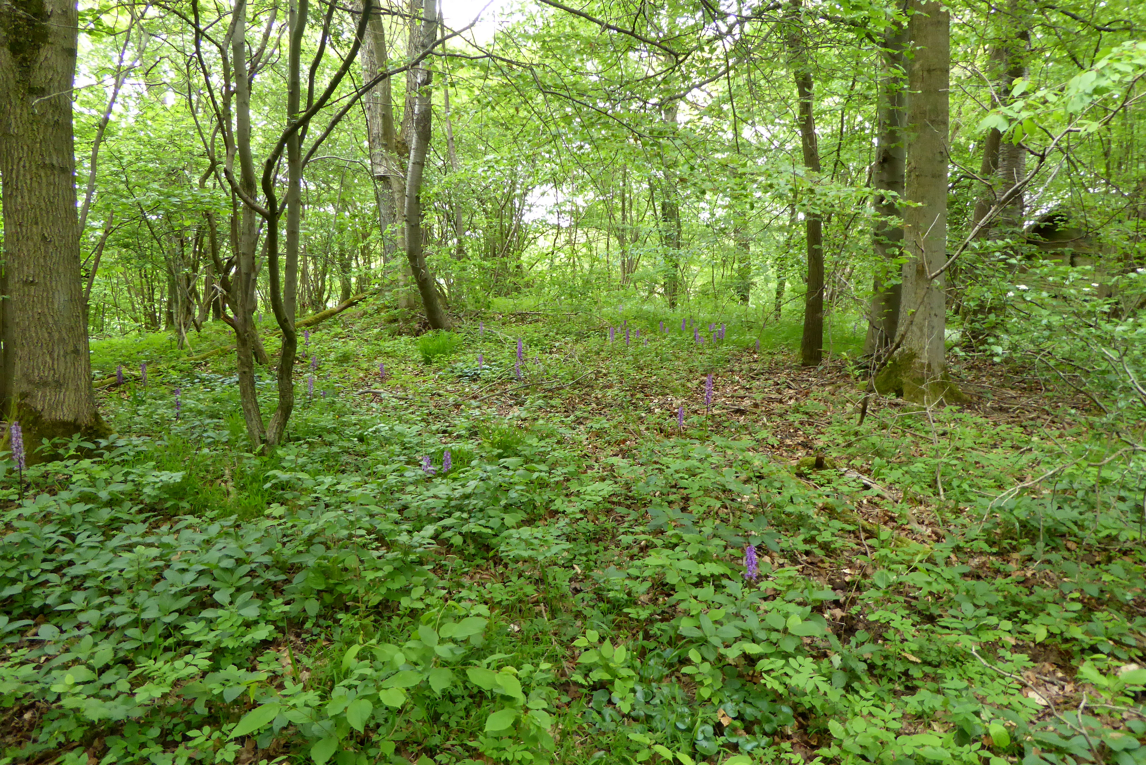 Orchideen auf dem Gladeberg bei Asche, Stadt Hardegsen, Südniedersachsen nahe dem Naturdenkmal "Orchideen am Gladeberg")